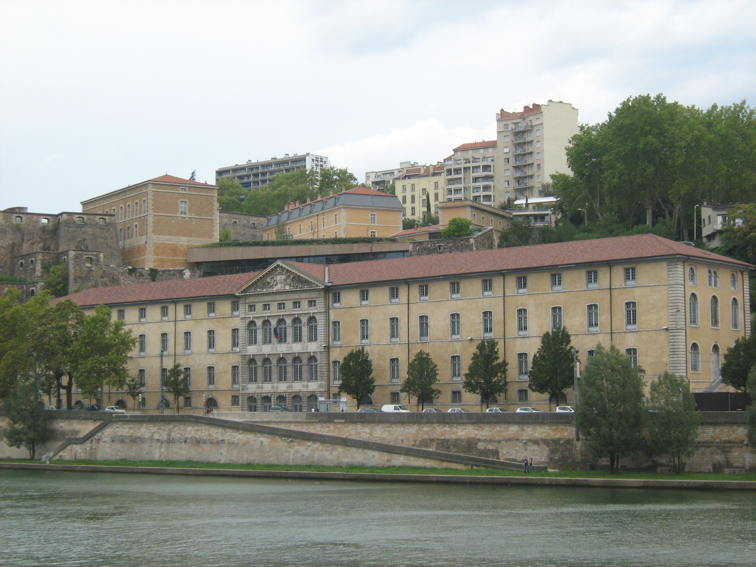 Le Grenier d'abondance vu depuis la rive droite de la Saône.